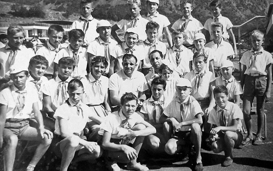 Июль 1962, Артек, II Всесоюзный слёт пионеров. Ю. А.Гагарин с духовым оркестром Лен. обл. муз. дет. дома им. Н.А.Римского-Корсакова.